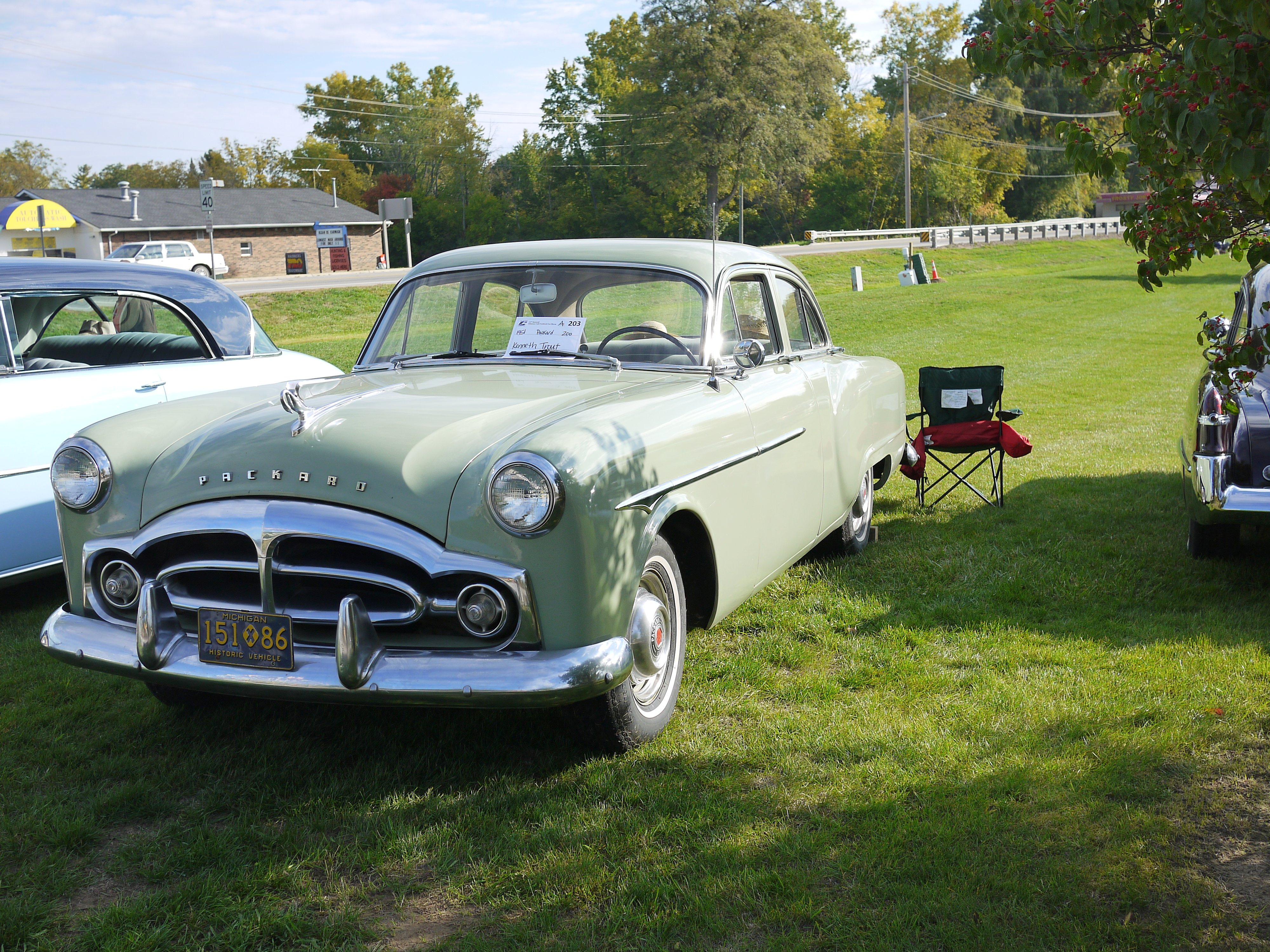 1951 Packard 200 Touring Sedan model 2401-2492